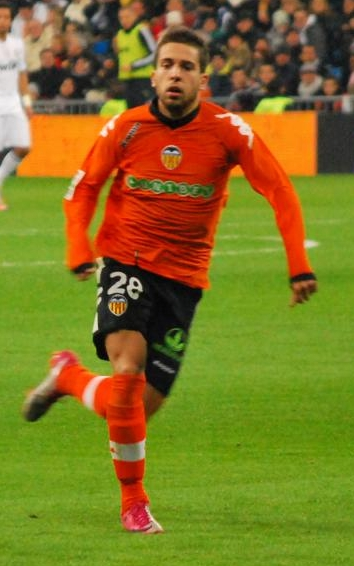 Partit de lliga del 4 de desembre de 2010 R. Madrid 2-0 València CF